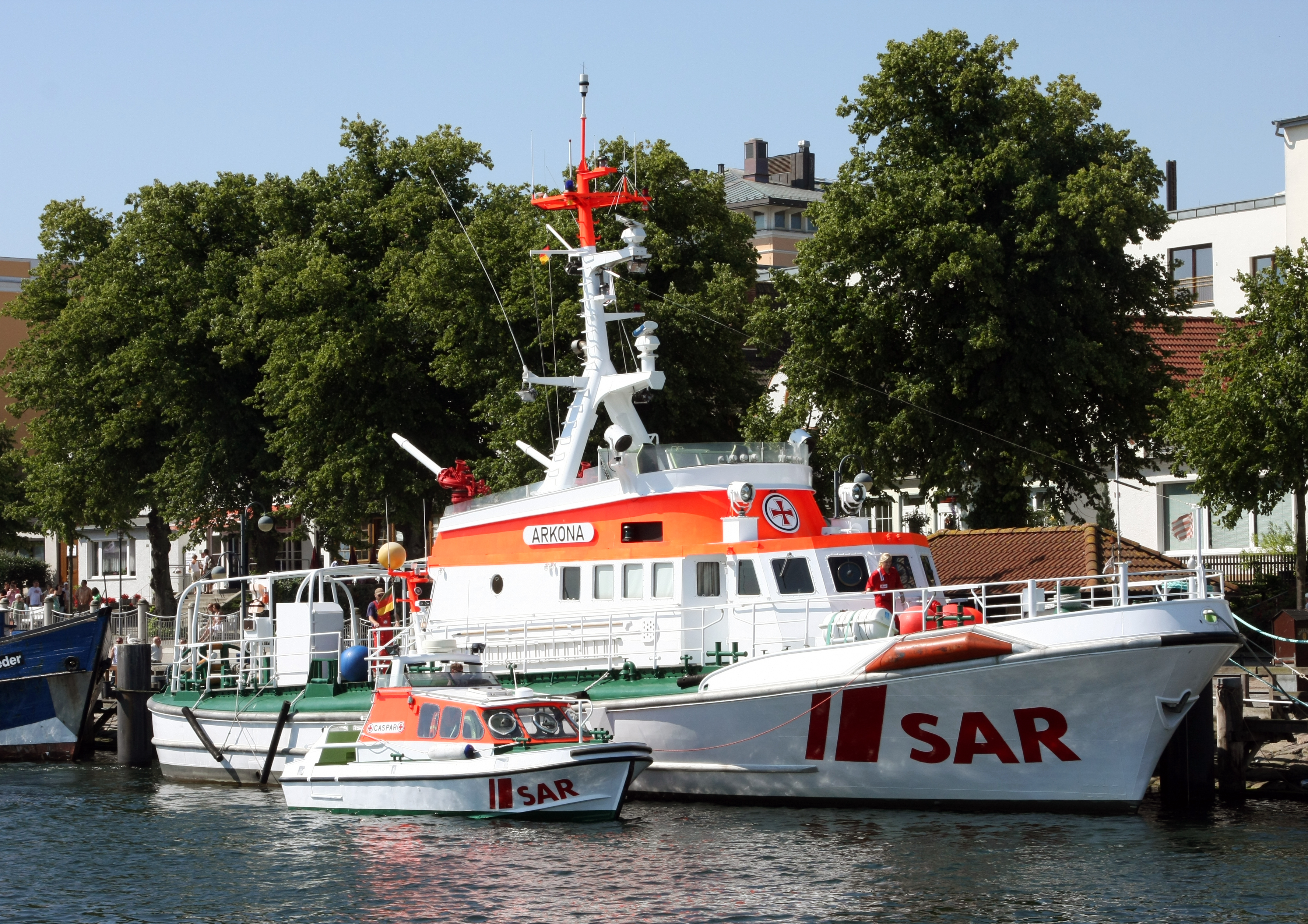 SK Arkona im Juli 2008 am Anleger in Warnemünde